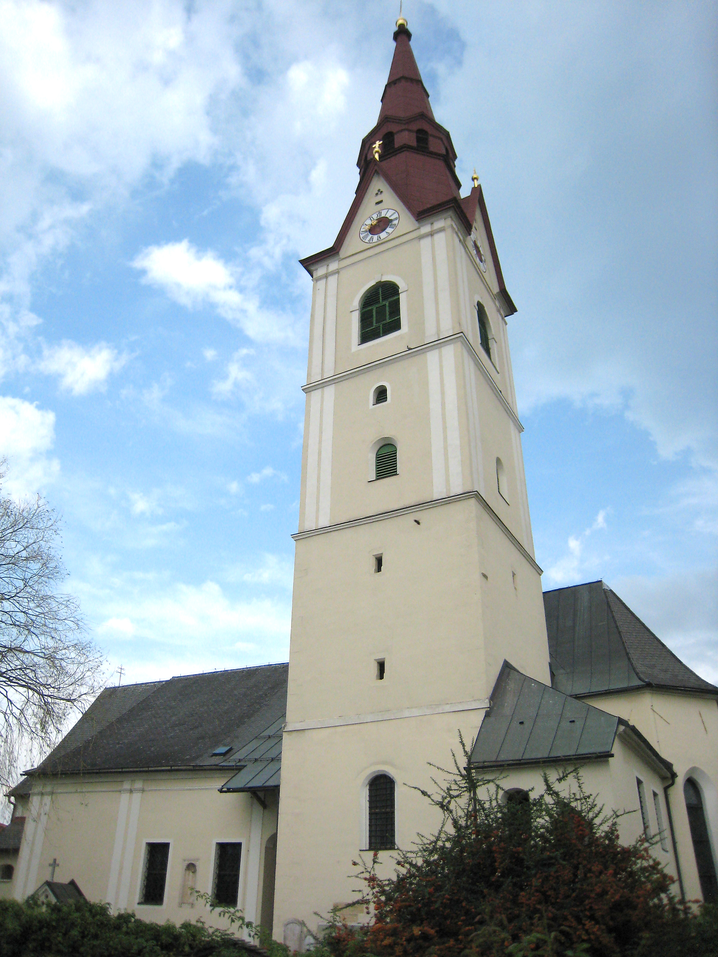 Kath. Pfarrkirche hl. Laurentius und Kirchhof